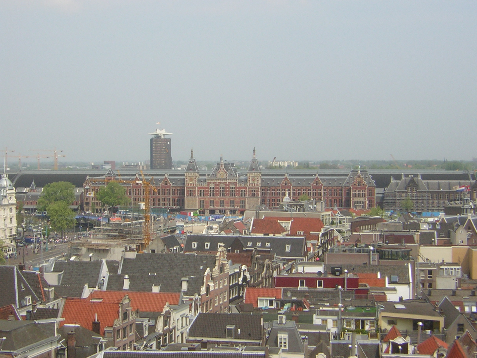 Amsterdam Centraal van een wat grotere afstand. Licensing Amsterdam Centraal